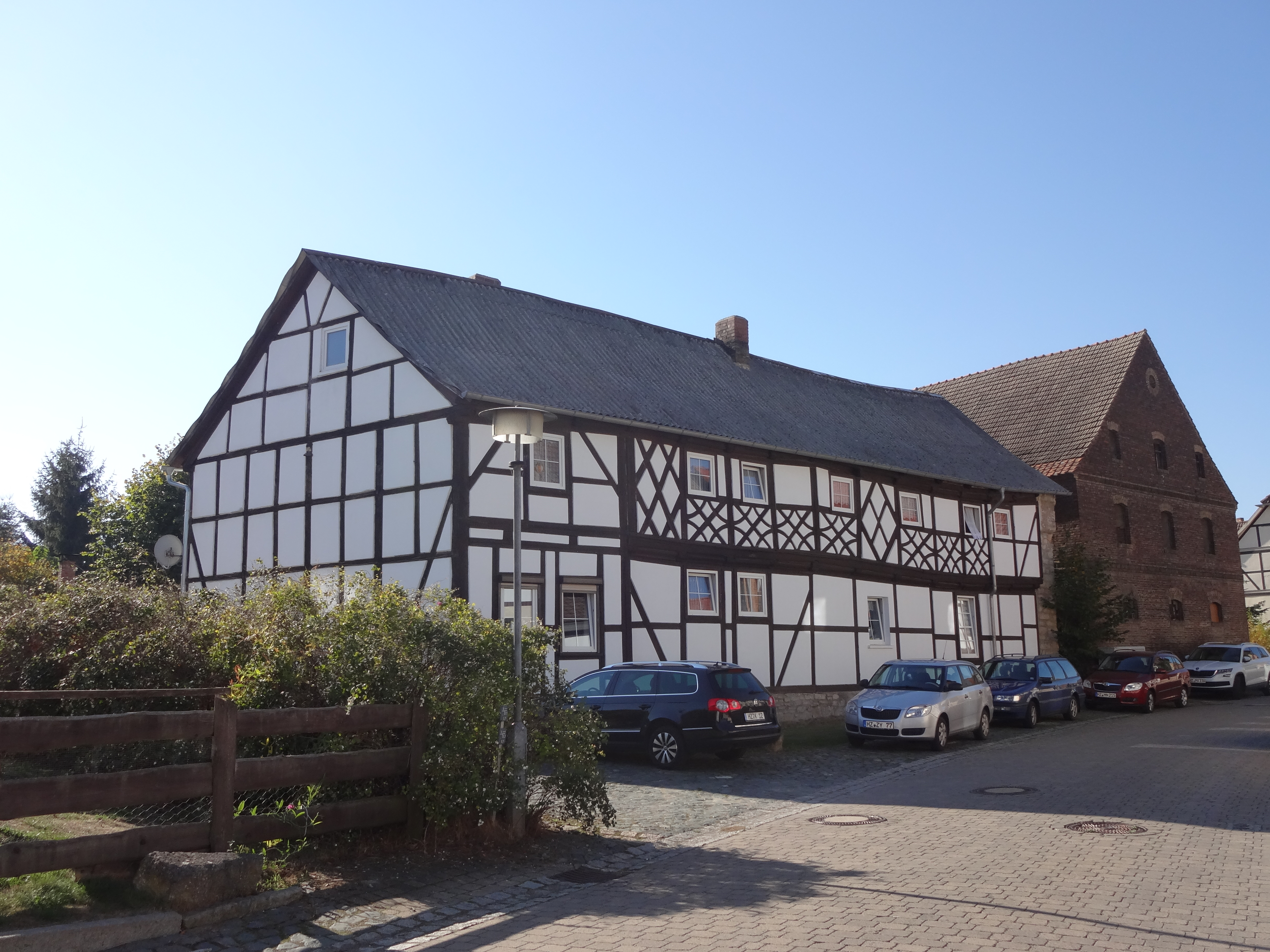 denkmalgeschütztes Bauernhaus in der Dorfstraße 6 in Zilly